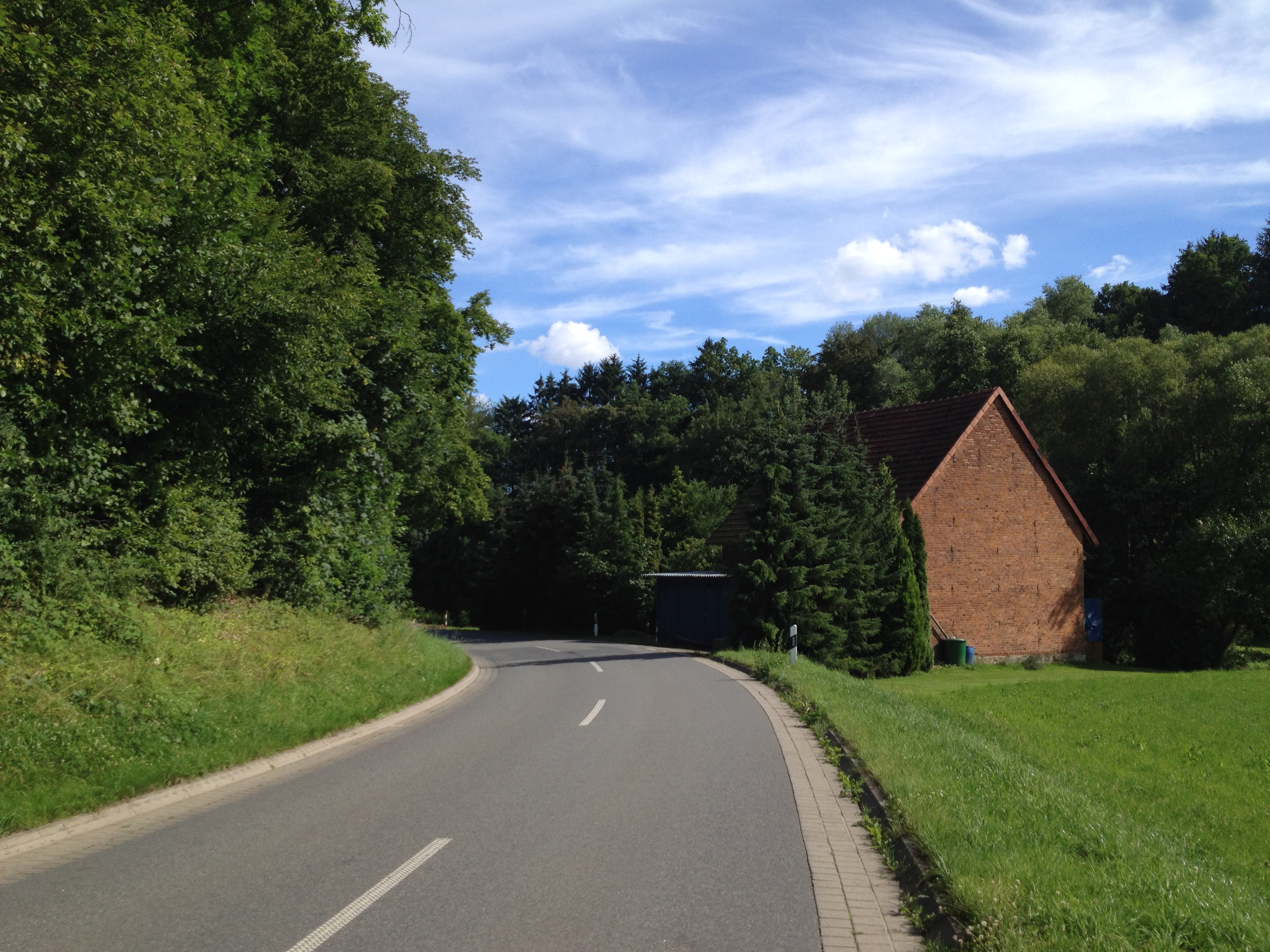 Der Märchenland-Radrundweg südwestlich von Fuldatal-Knickhagen auf der Osterbachstraße (Kreisstraße 40)